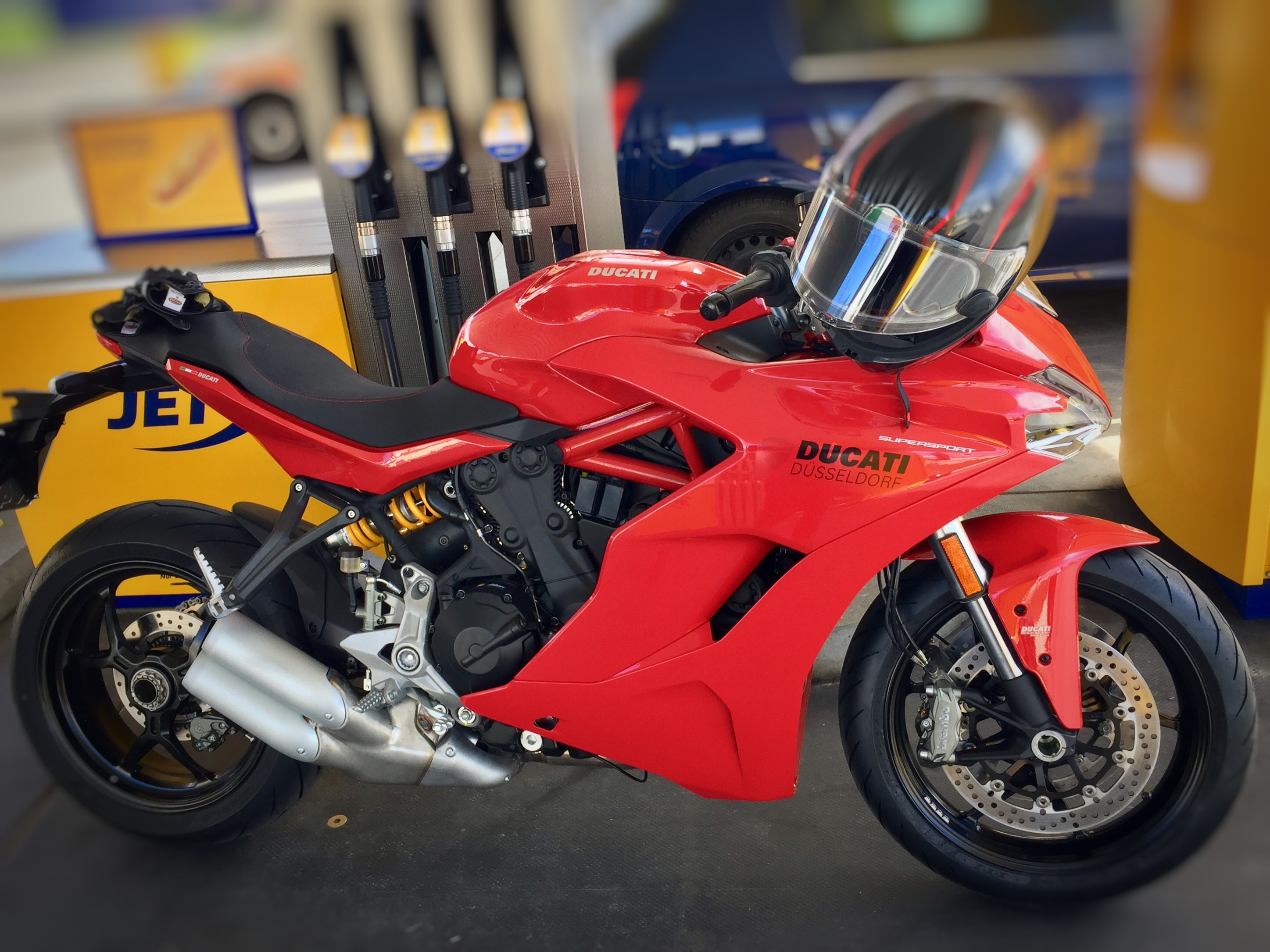 Ducati SuperSport - Model 2017